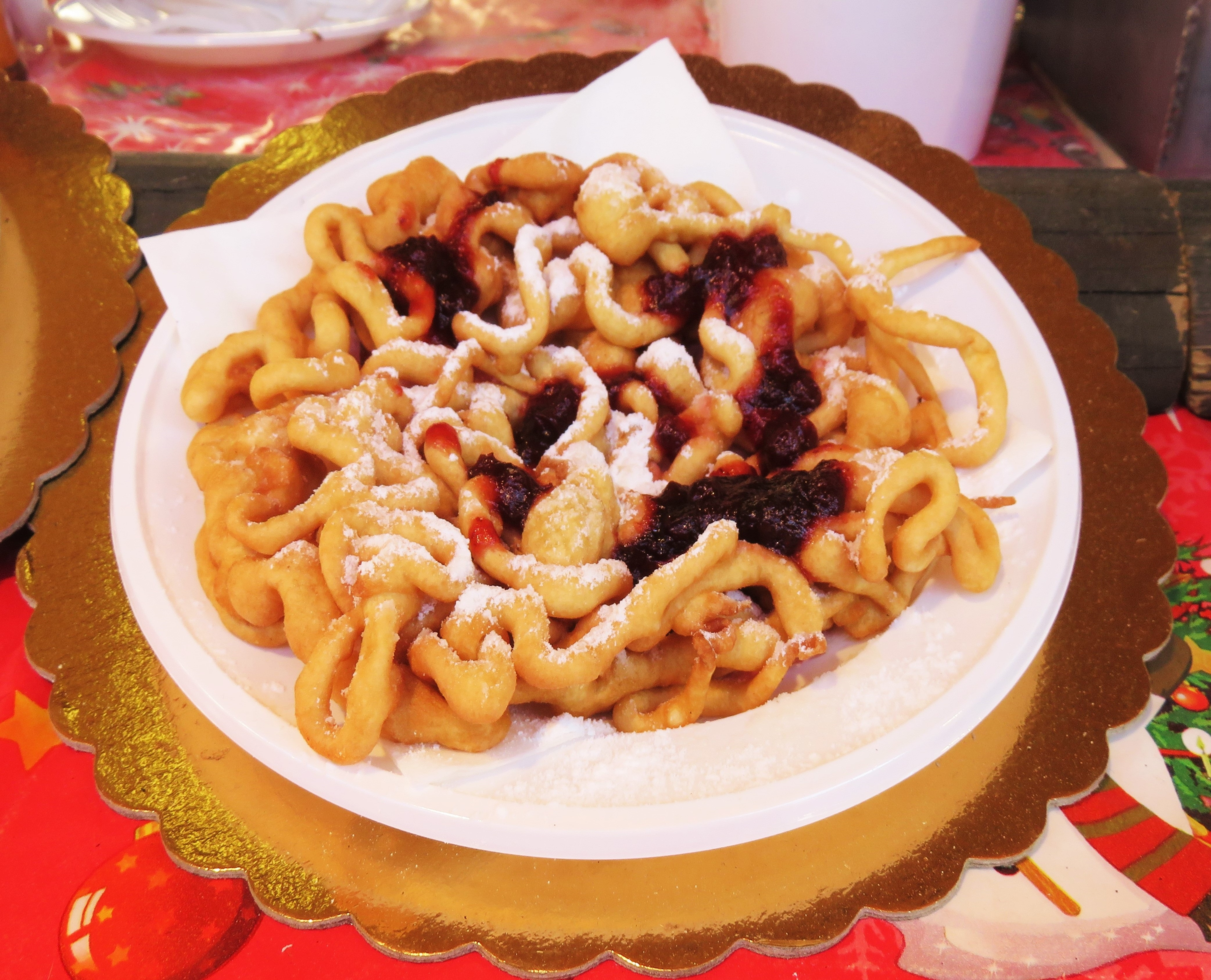 strauben tirolesi, tipici anche dell'Alto Adige, qui serviti con una spruzzata di zucchero velo e marmellata di mirtilli